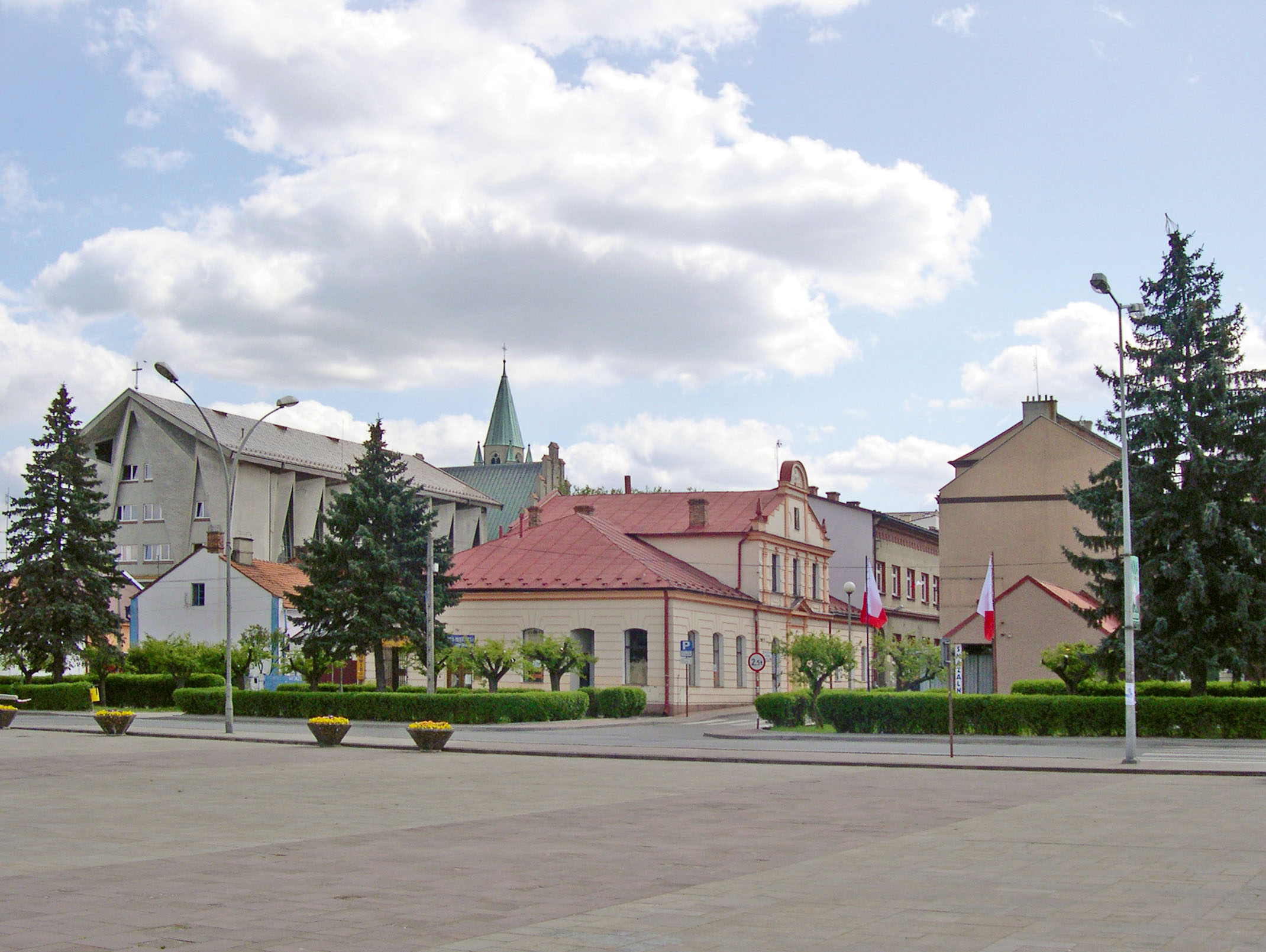 Synagogue in Brzesko